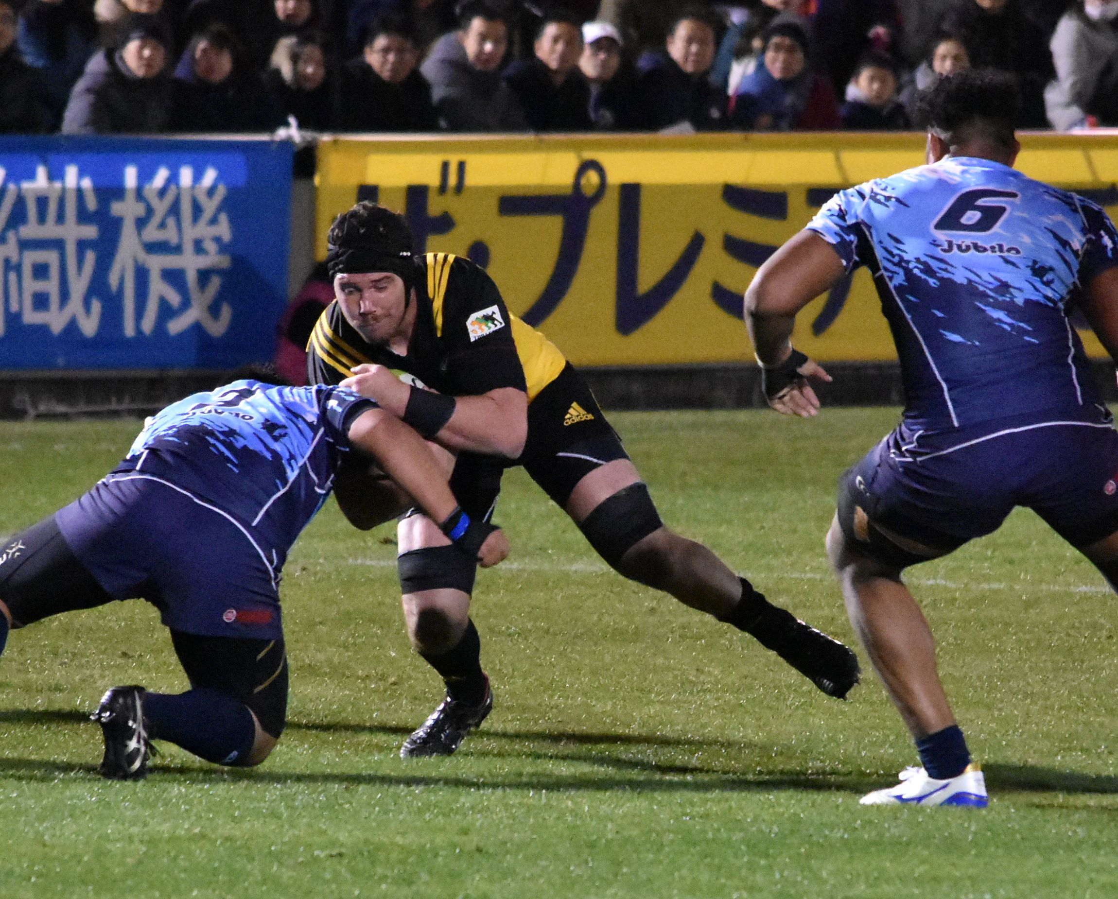 ジョー・ウィーラー